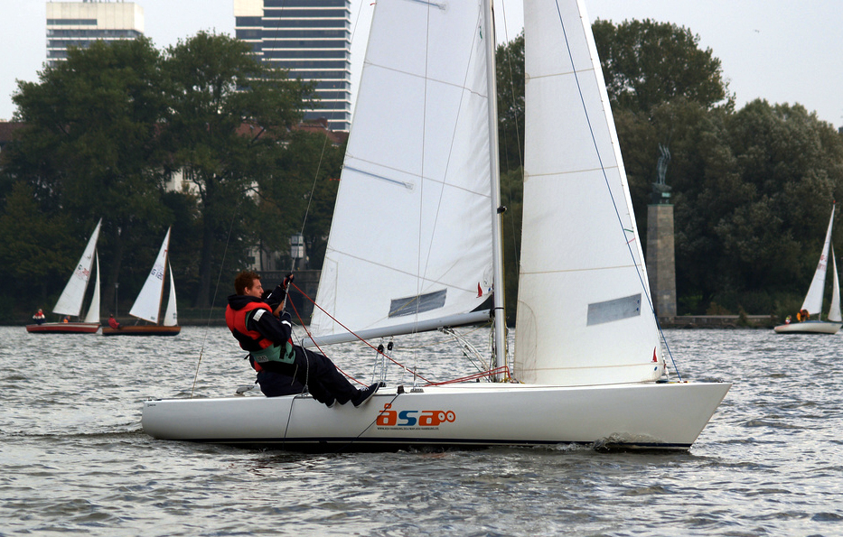 Dyas